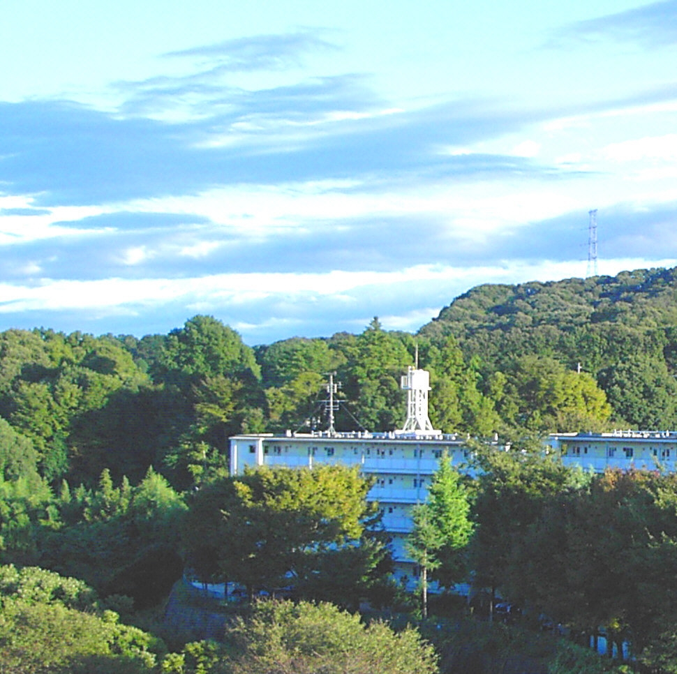 Machida Hills